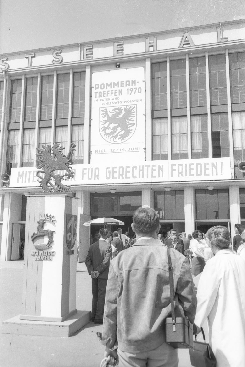 Unter dem Motto "Miteinander für gerechten Frieden". Abschlusskundgebung in der Ostseehalle.